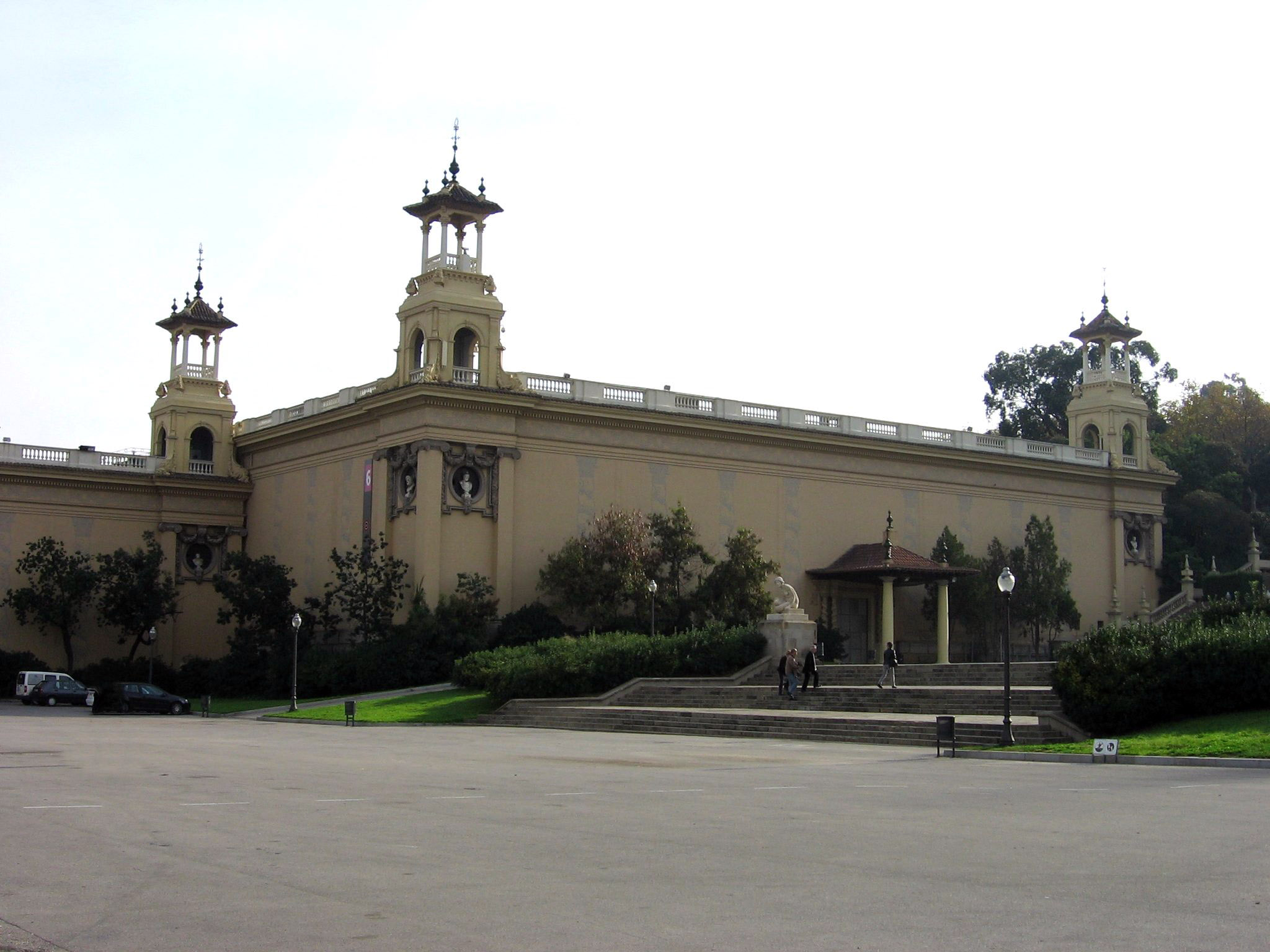 Palacio de ALfonso XIII, Montjuïc (Barcelona)